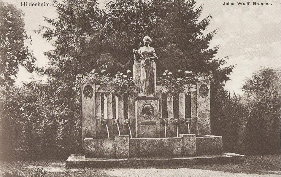 Julius-Wolff-Brunnen / Renatabrunnen in Hildesheim, Sedanstraße; 1911 von Bildhauer Paul Juckoff; nicht erhalten